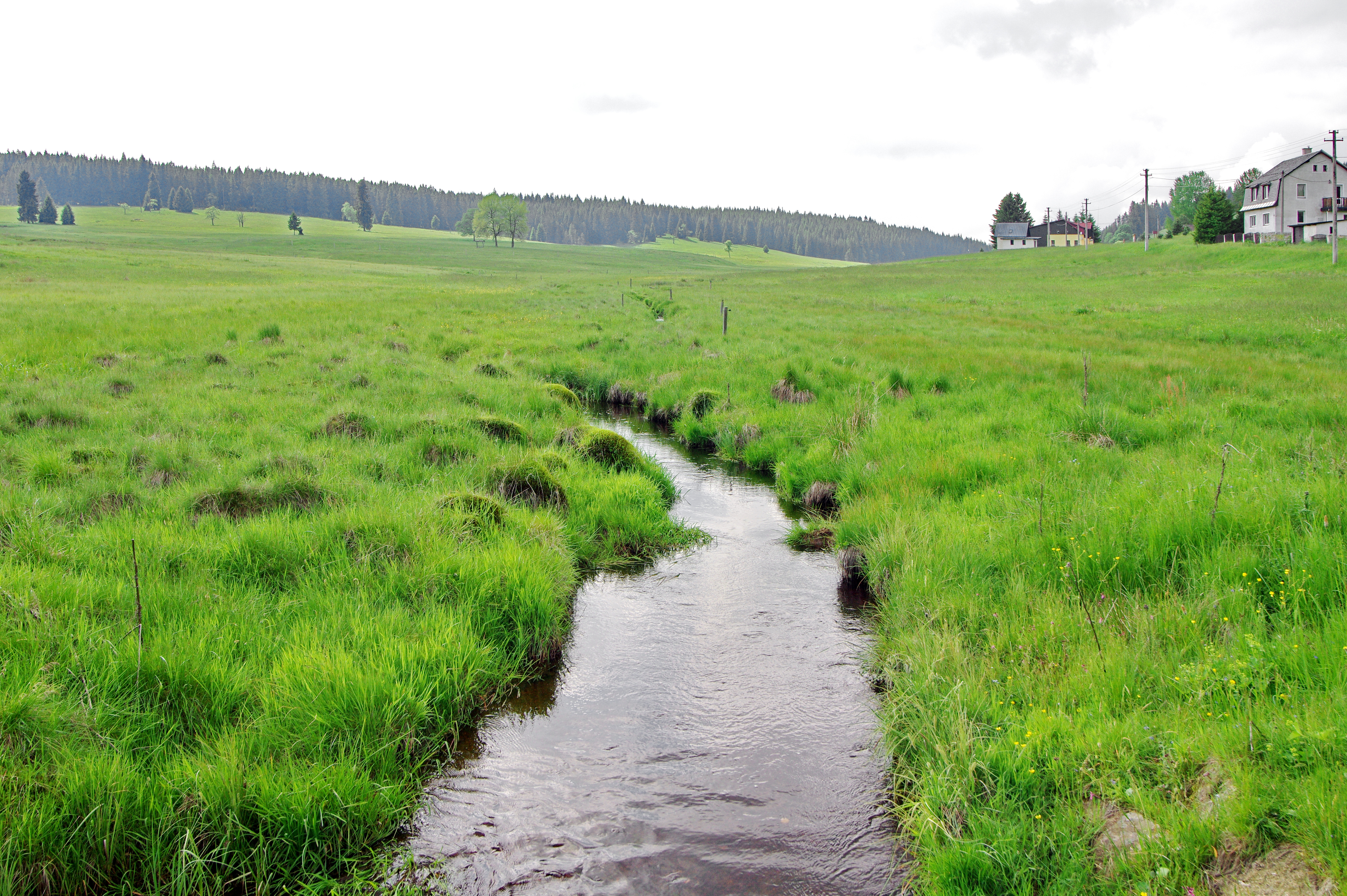 Potok Černá voda (přítok Rolavy), v Jelení v Krušných horách